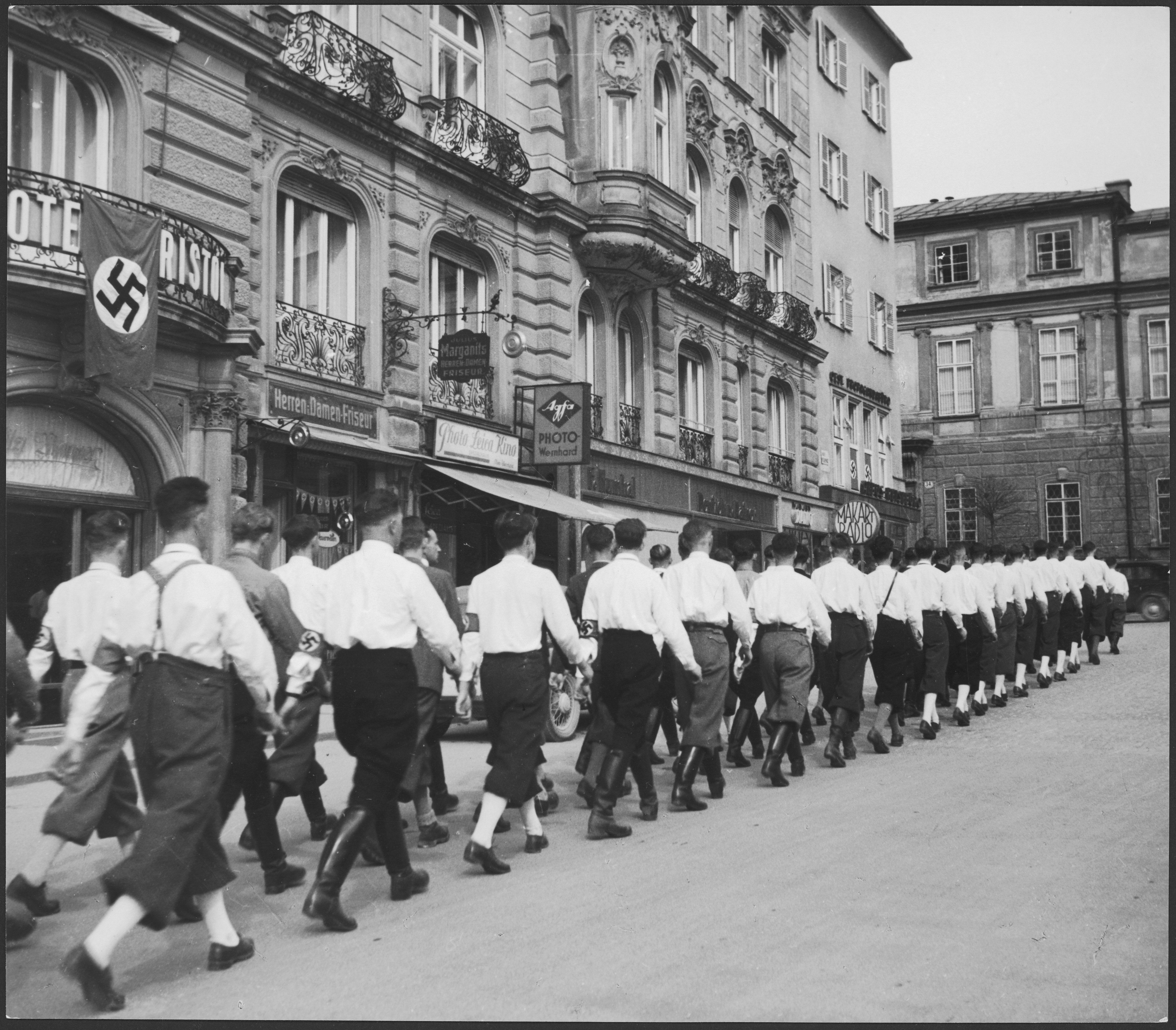 Österreich, Salzburg: Menschen; Männer mit Hakenkreuz-Armbinde maschieren durch die Strassen